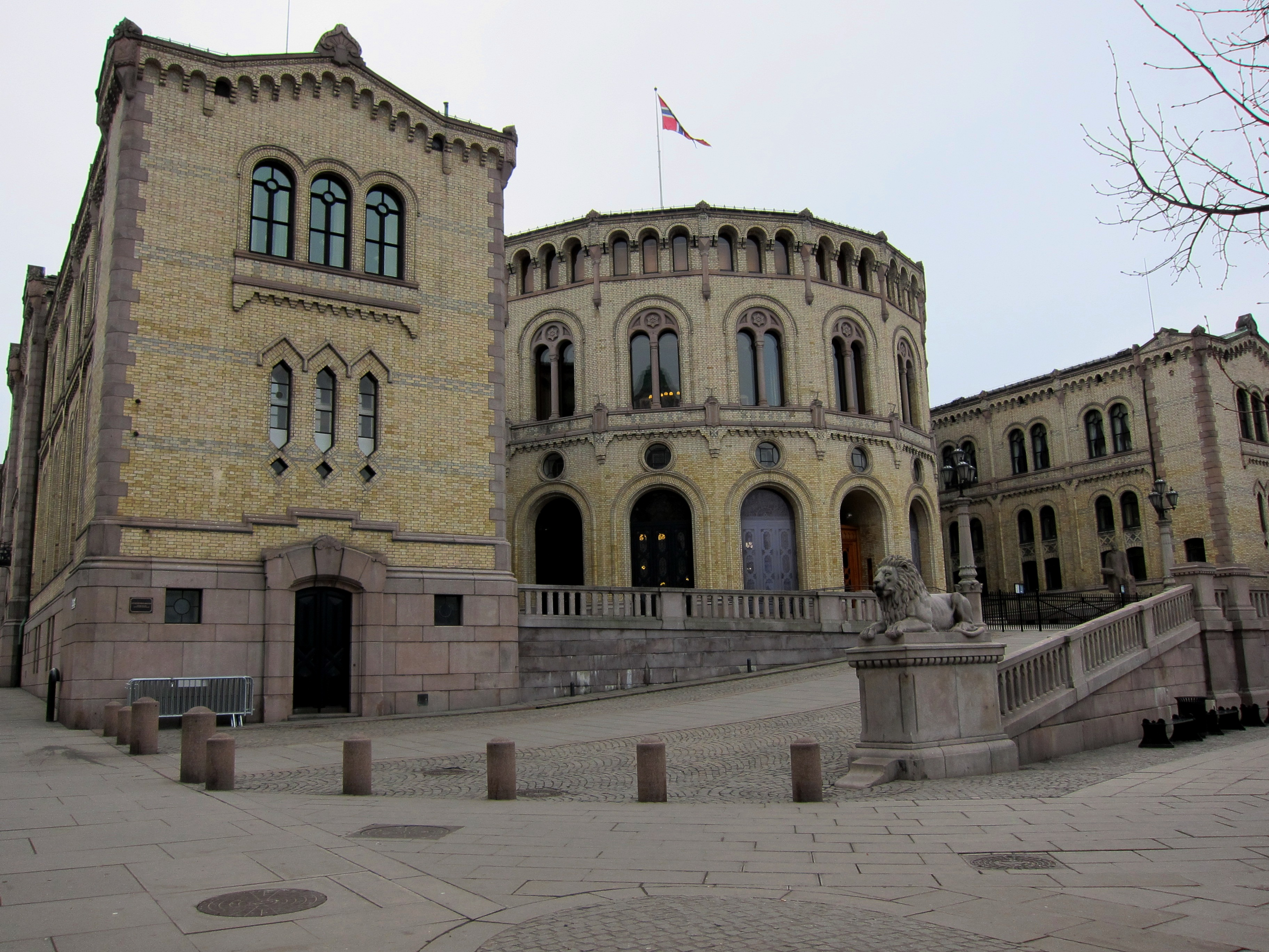 Norvegijos parlamentas